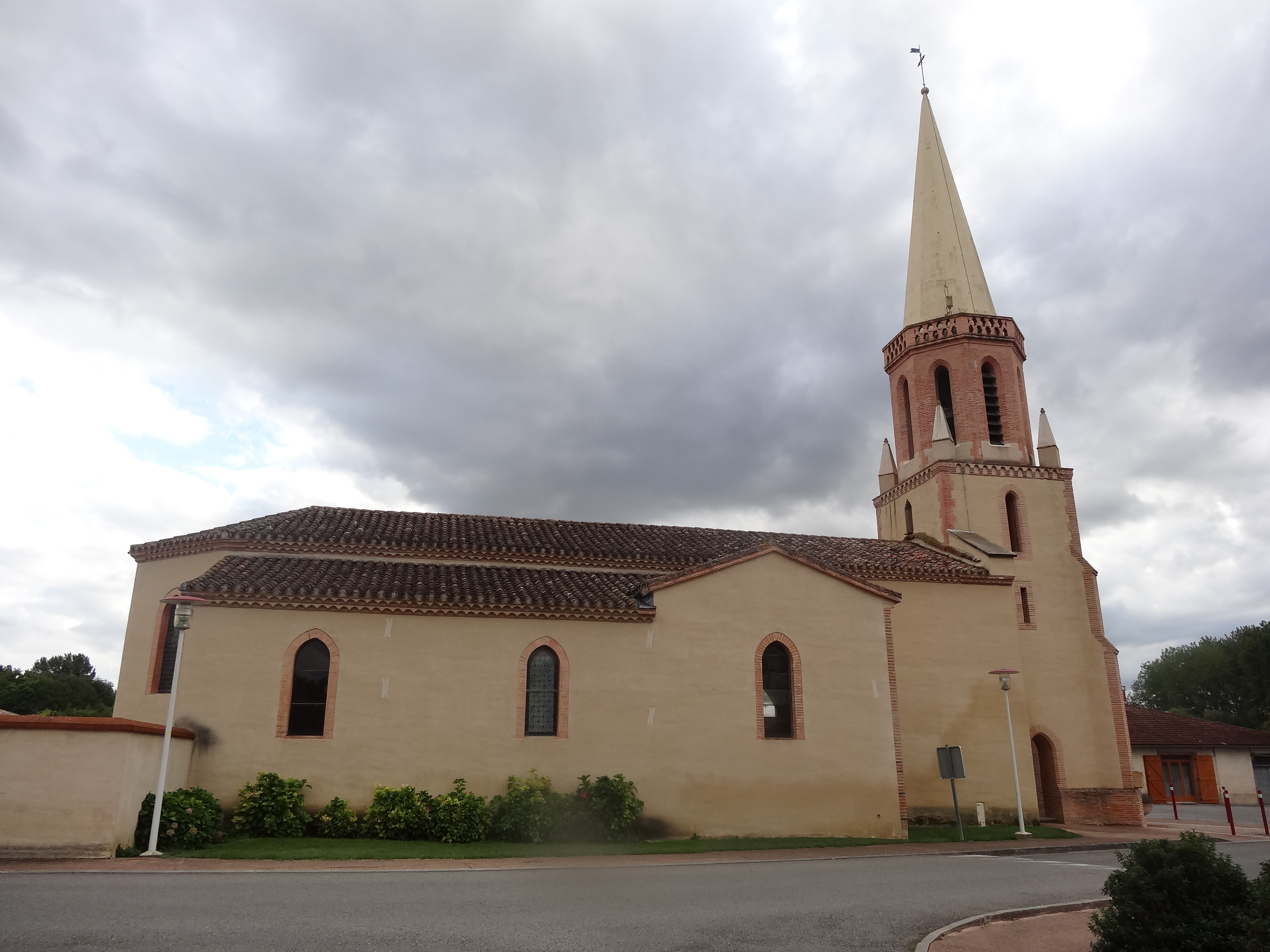 L'église d'Aurimont.